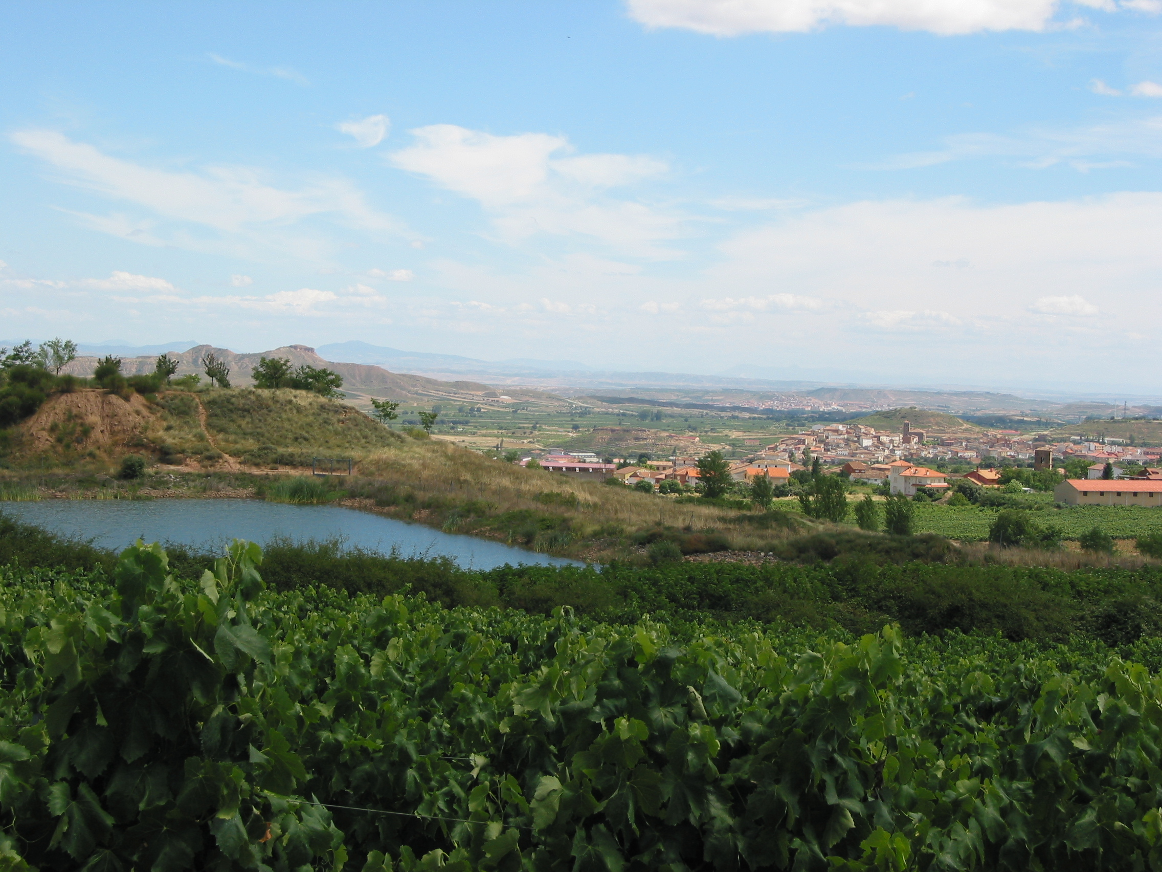 Balsa de Medrano (La Rioja). A la derecha de la imagen en primer término está Medrano, detrás está Entrena y al fondo se avista Lardero.